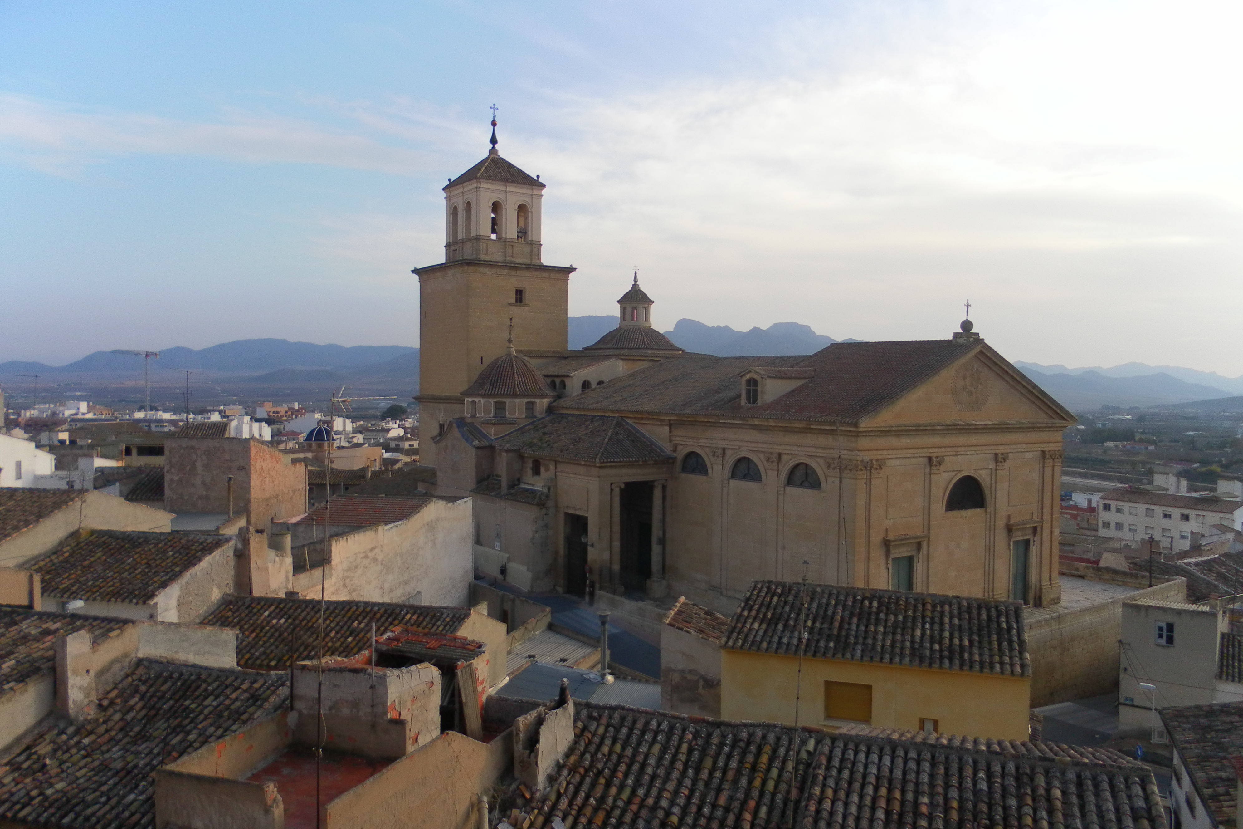 Iglesia de Santiago. Jumilla (Región de Murcia, España).